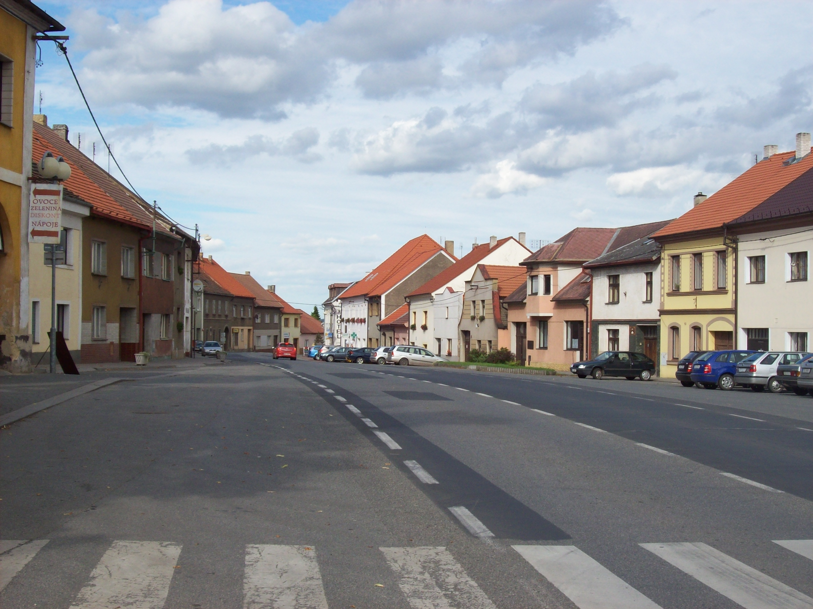 Cerhovice - náměstí Kapitána Kučery, silnice 605